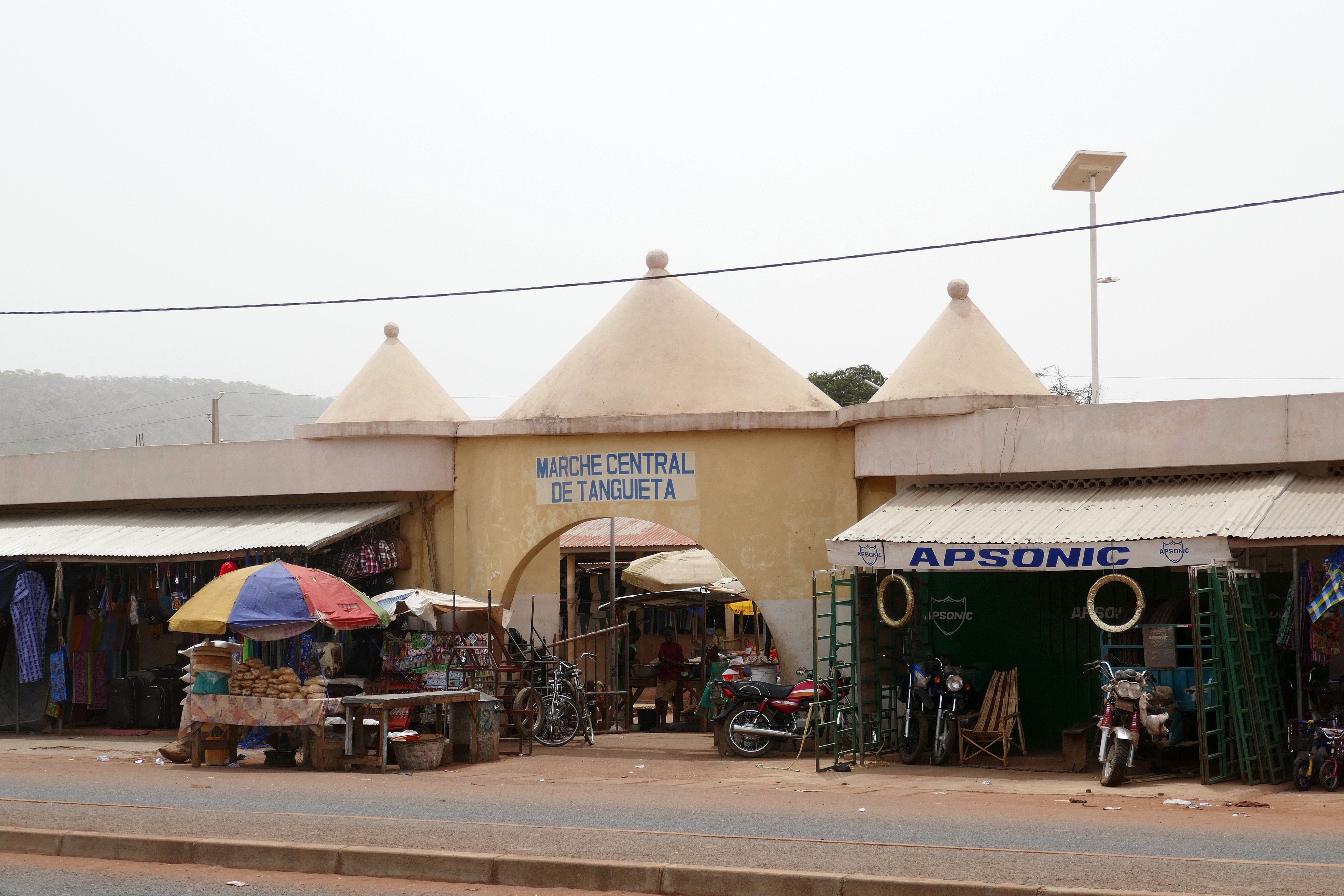 Marché central de Tanguieta (Bénin)